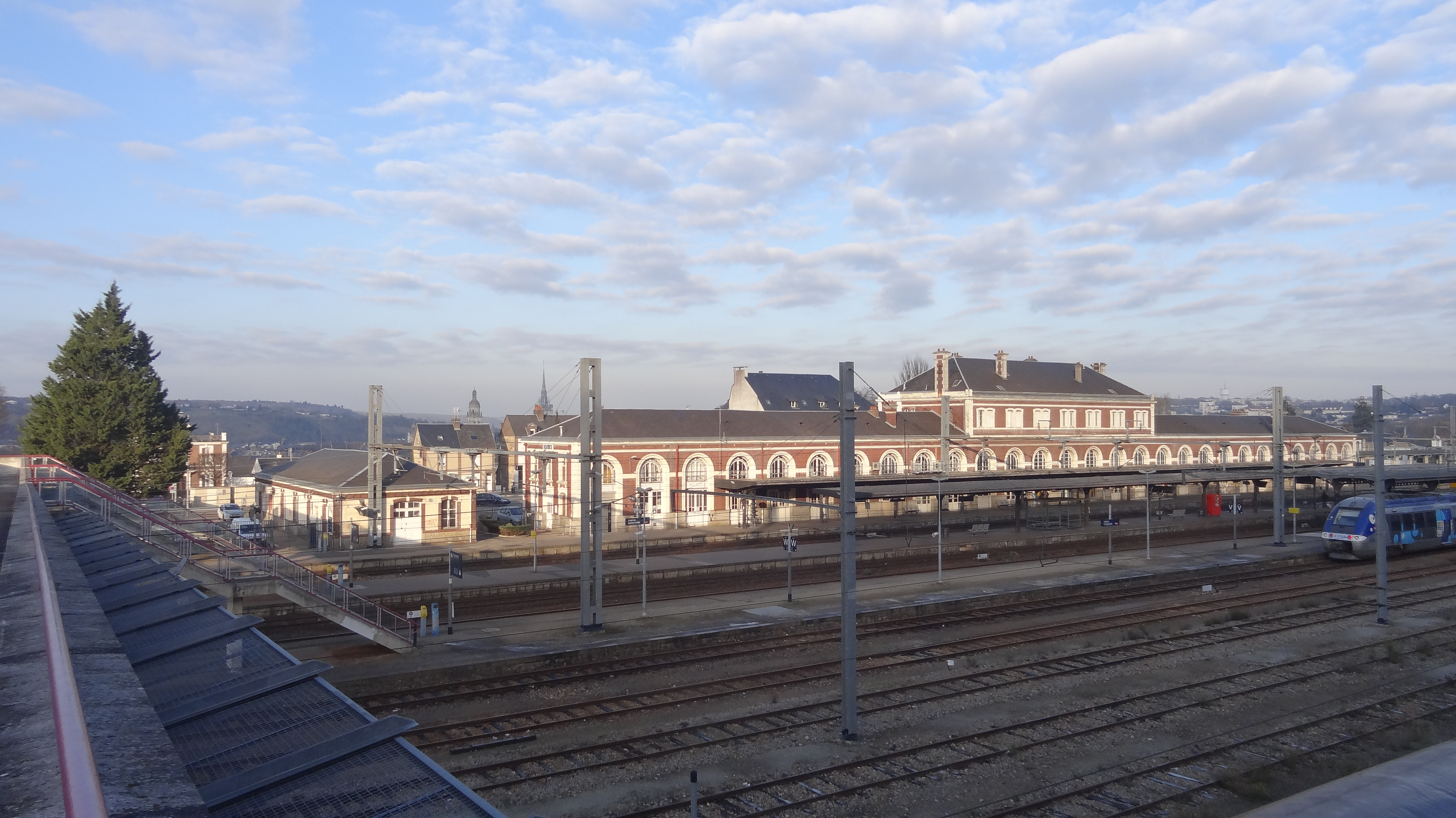 Gare d'Évreux-Normandie, Eure, France - Vue côté voies.